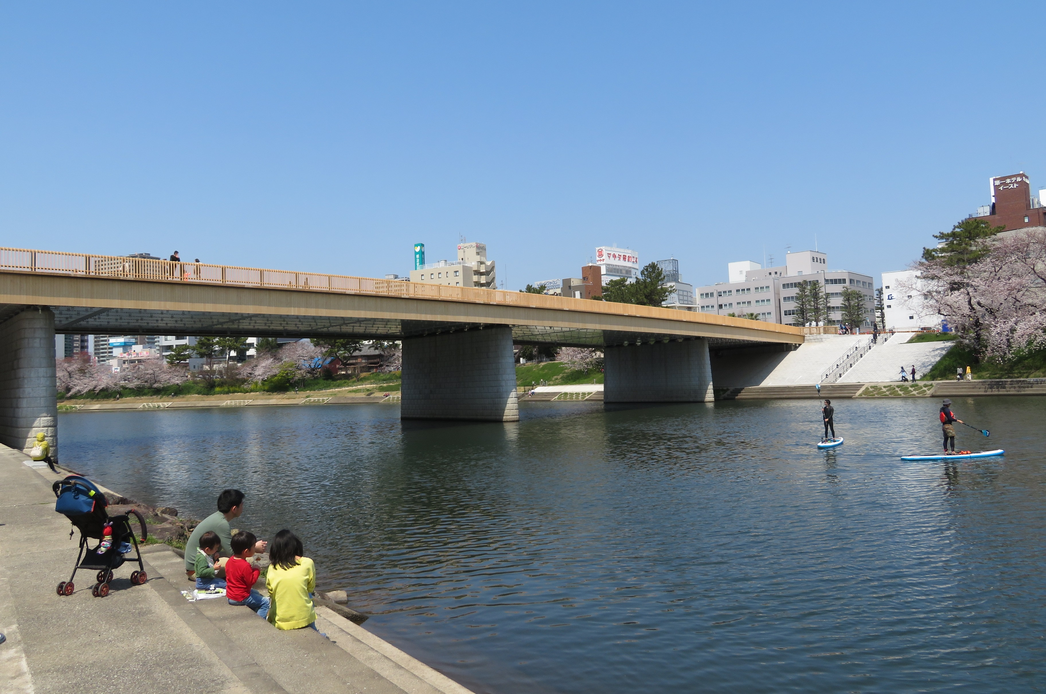 乙川と桜城橋